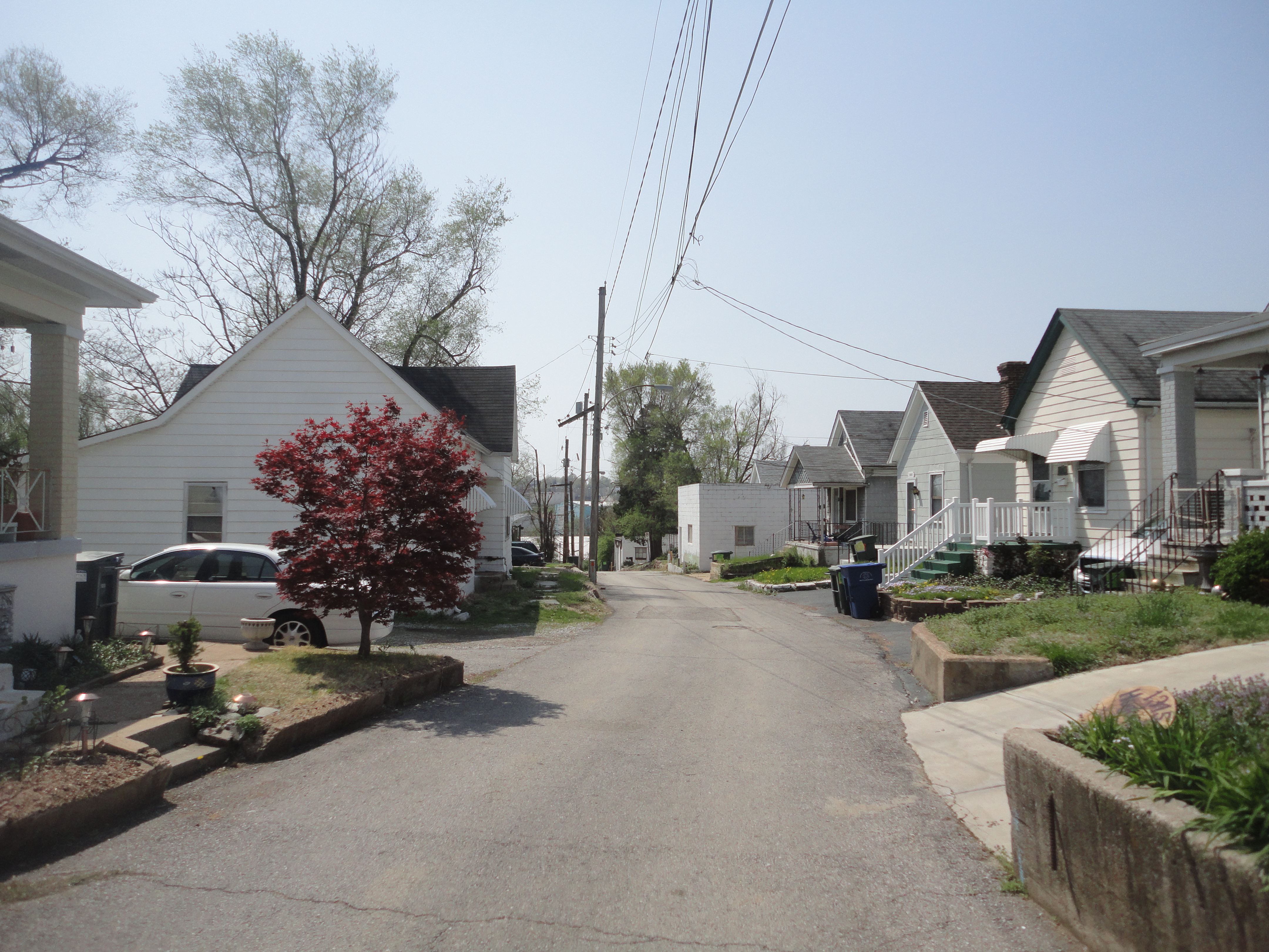 Tiny Cheltenham Street